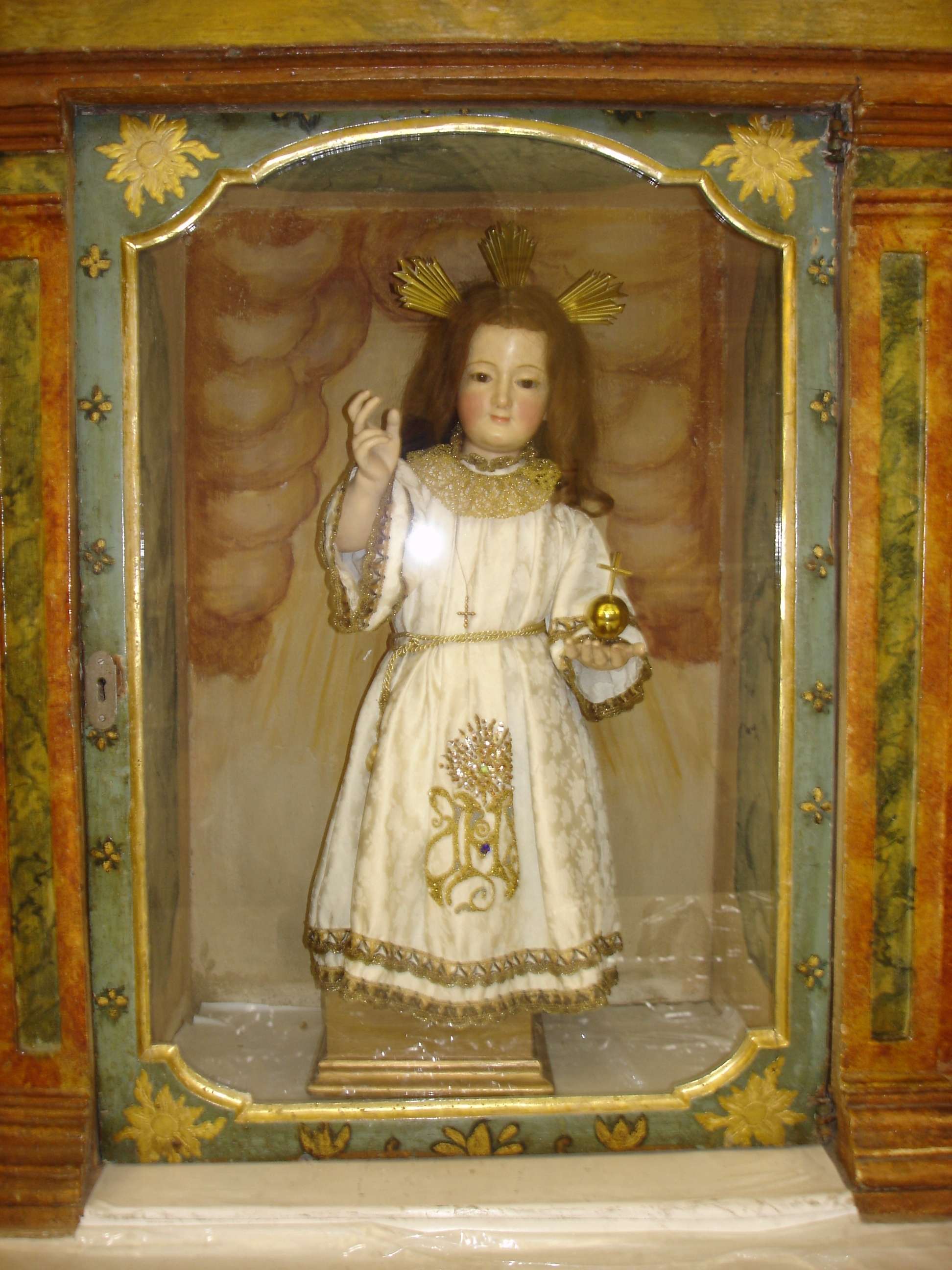 Foto del "Cautivico", en la Iglesia de Santa María la Mayor, Épila, prov. de Zaragoza, Aragón, España